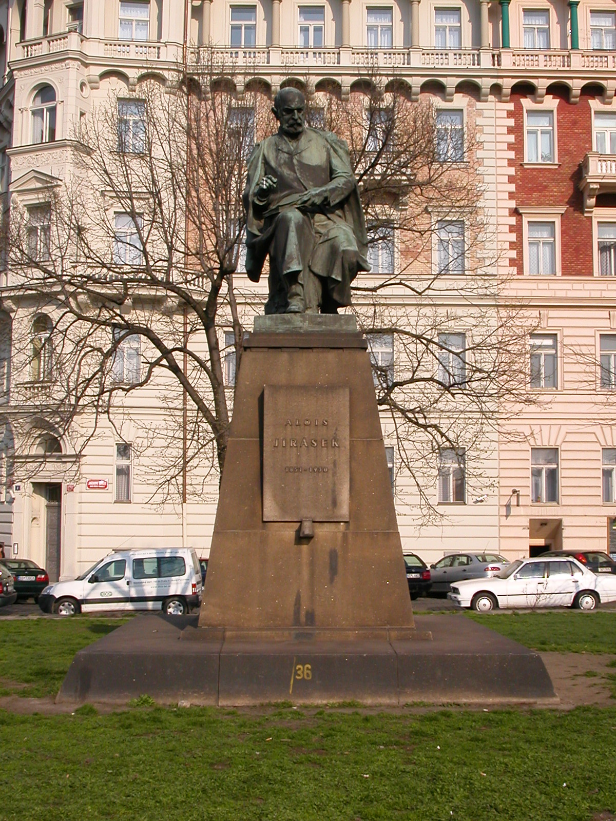 Statue of Alois Jirásek in Jiráskovo náměstí, Prague